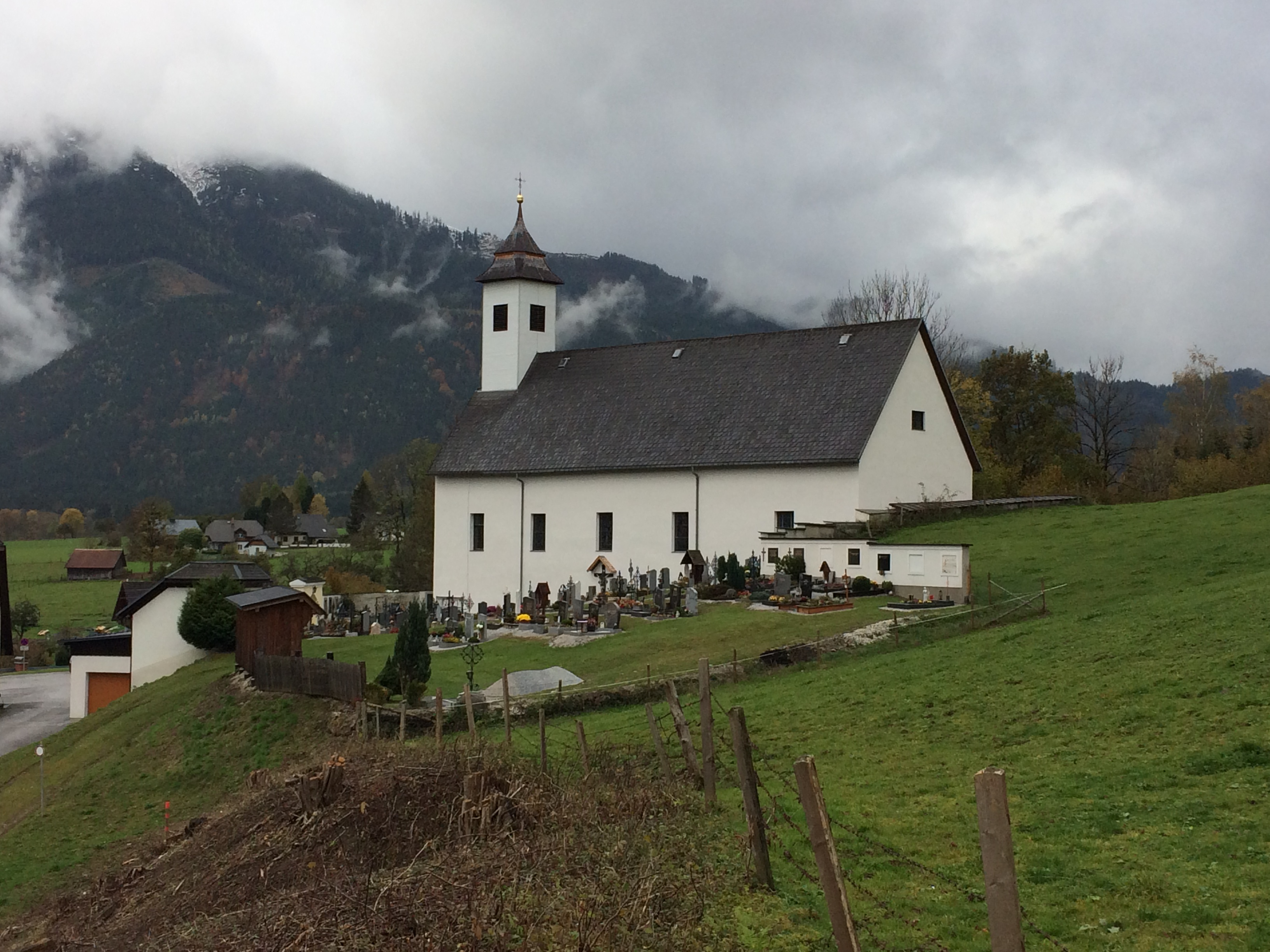 Pfarrkirche Hall bei Admont (Austria)